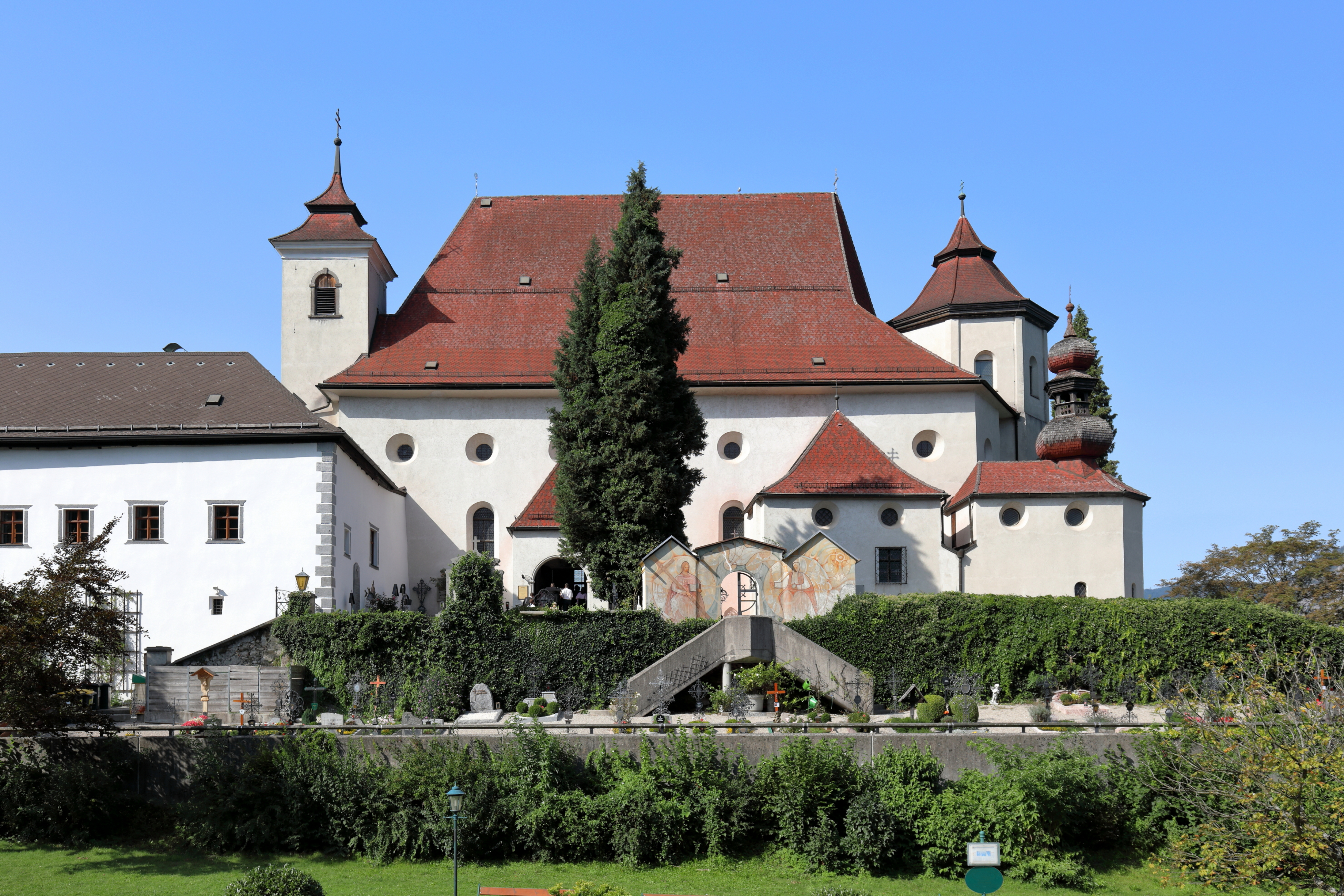 Südansicht der röm.-kath. Pfarrkirche Mariä Krönung in der oberösterreichischen Gemeinde Traunkirchen und davor der auf zwei Trassenebenen angelegte Friedhof.Ursprünglich als dreischiffige Klosterkirche ab 1632 errichtet und 1652 geweiht, nachdem die Vorgängerkirche in der Nacht vor dem 10. Jänner 1632 abbrannte. Nach der Aufhebung des Ordens 1773 wurde das barocke Bauwerk 1778 zur Pfarrkirche. 1804 trug man großteils den Turm ostseitig über dem Hochaltar ab und errichtete einen niederen Turm an der Westseite der Kirche.